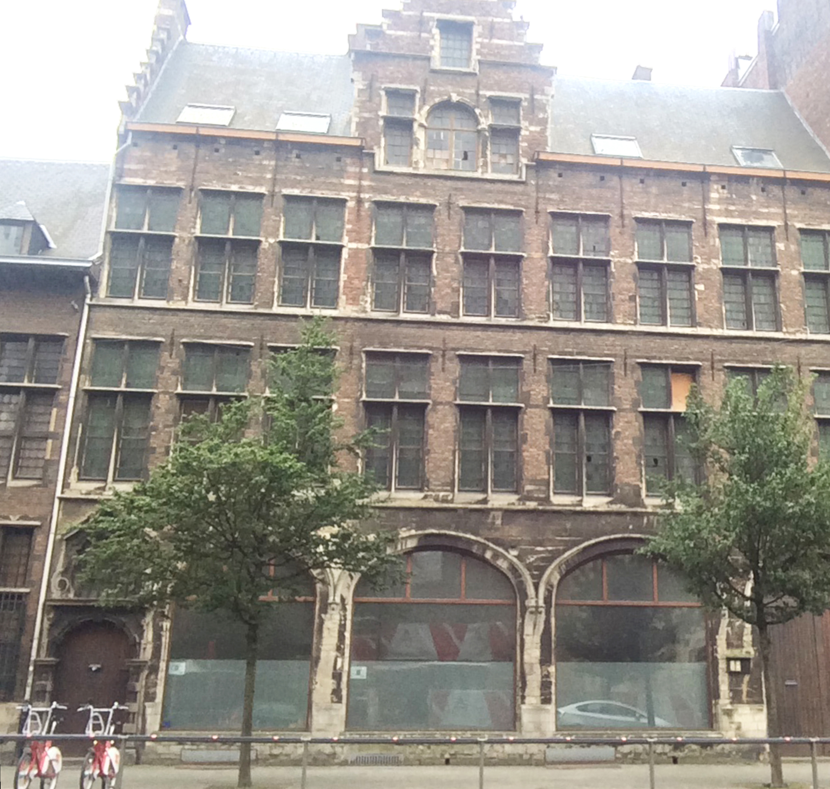 Voormalig Apostelinnenklooster op de Paardenmarkt 90 te Antwerpen.